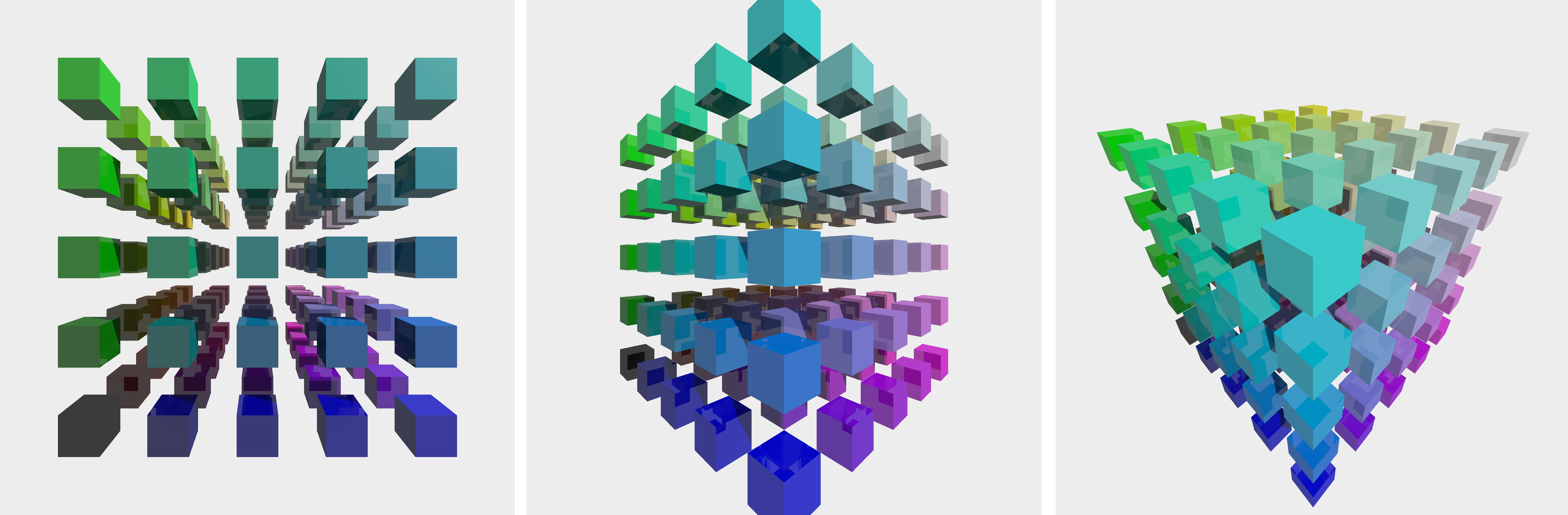 Một ví dụ ảnh phép chiếu phối cành tính bằng phương pháp dò tia Whitted. Có 125 khối lập phương trong cấu trúc lập phương 5×5×5. Ảnh kết xuất bằng phần mền doTia tôi sáng tạo. Phạm vi công cộng.